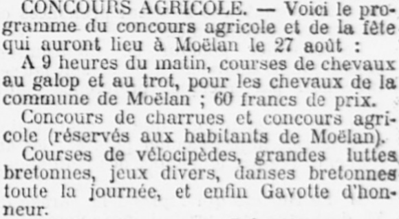 Programme du Concours agricole organisé à Moëlan le 27 août 1906 (journal L'Ouest-Eclair)